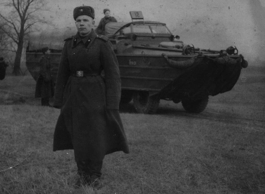 БАВ